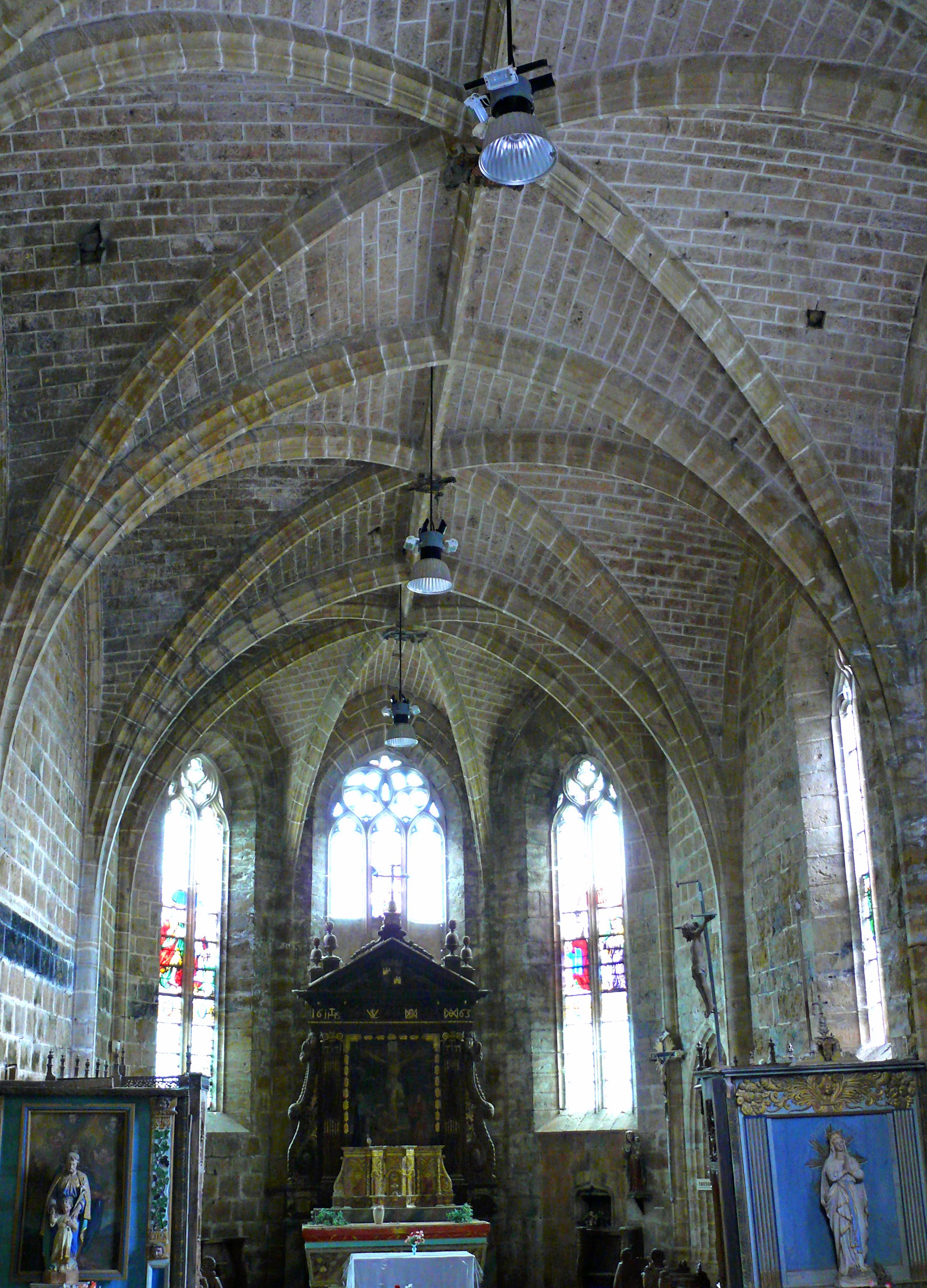 Château de Castelnau-Bretenoux - Collégiale Saint-Louis - Nef